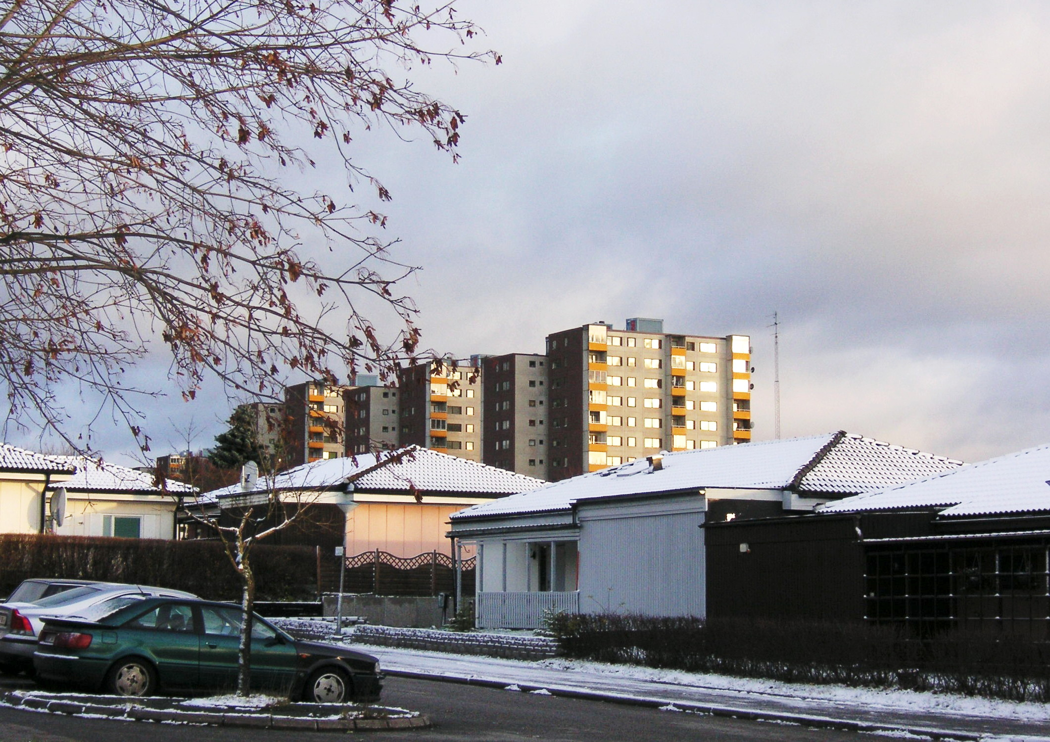 Fittja i Botkyrka kommun Sverige